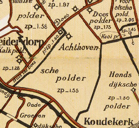 Achthovense polder